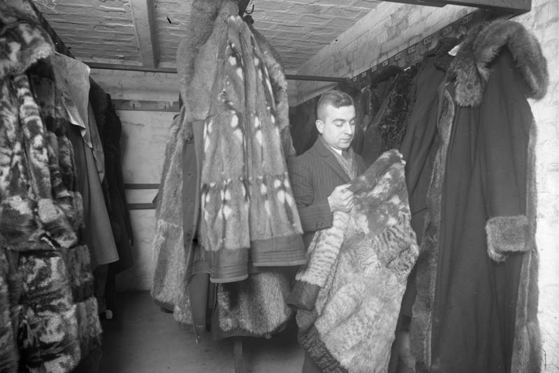 Die Räume der städt. Pfandkammer in Berlin überfüllt, ein Zeichen unserer Not ! Die Pelzkammer des städt. Leihhauses in Berlin, in welcher täglich Pelzsachen verpfändet werden, ein Zeichen der fortschreitenden Not. Information added by Wikimedia users.